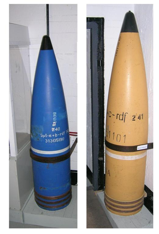 Prosjektiler til 38cm kanon på Batterie Vara